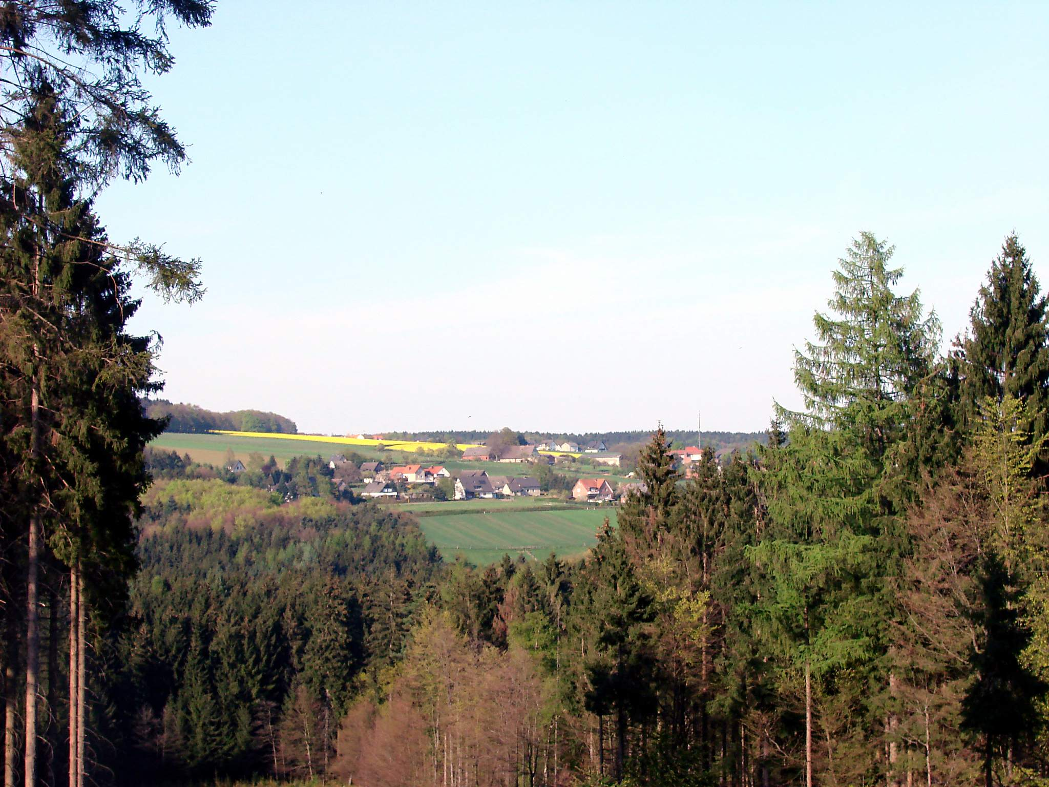 Ansicht von Büscherheide, einem Ortsteil von Bad Essen im Landkreis Osnabrück. Aufnahme erfolgte vom Großen Kellenberg im Wiehengebirge.